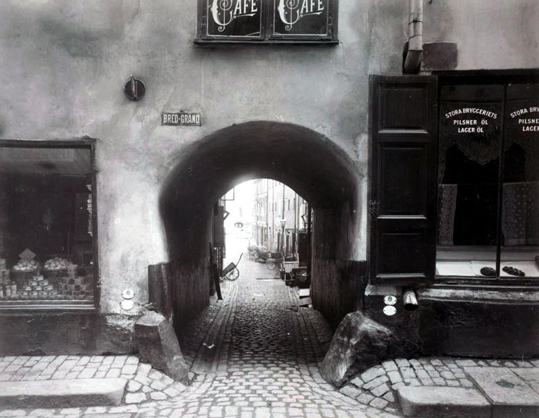 Valv Bredgränd från Österlånggatan